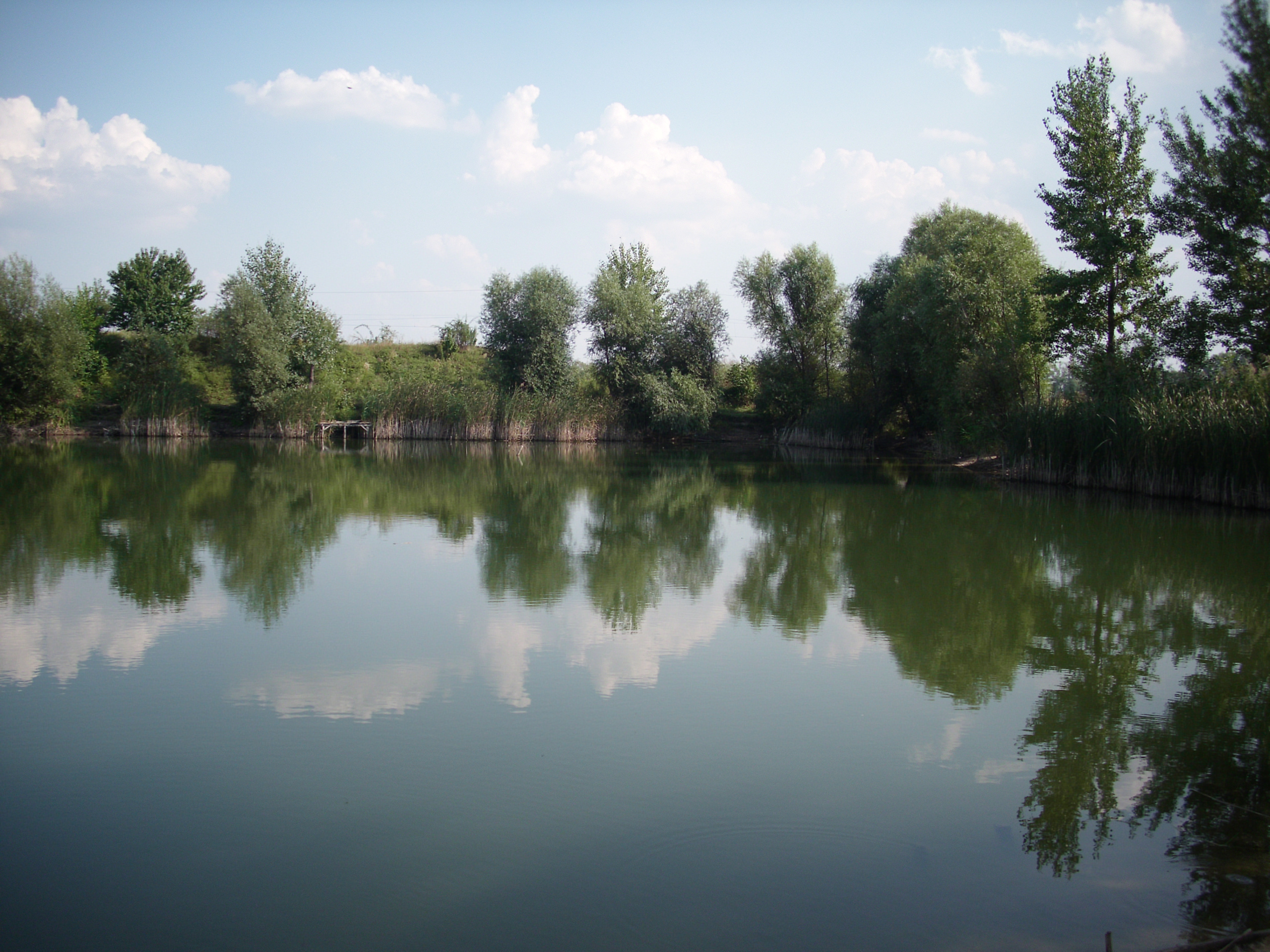 "2-es tó" Csobád